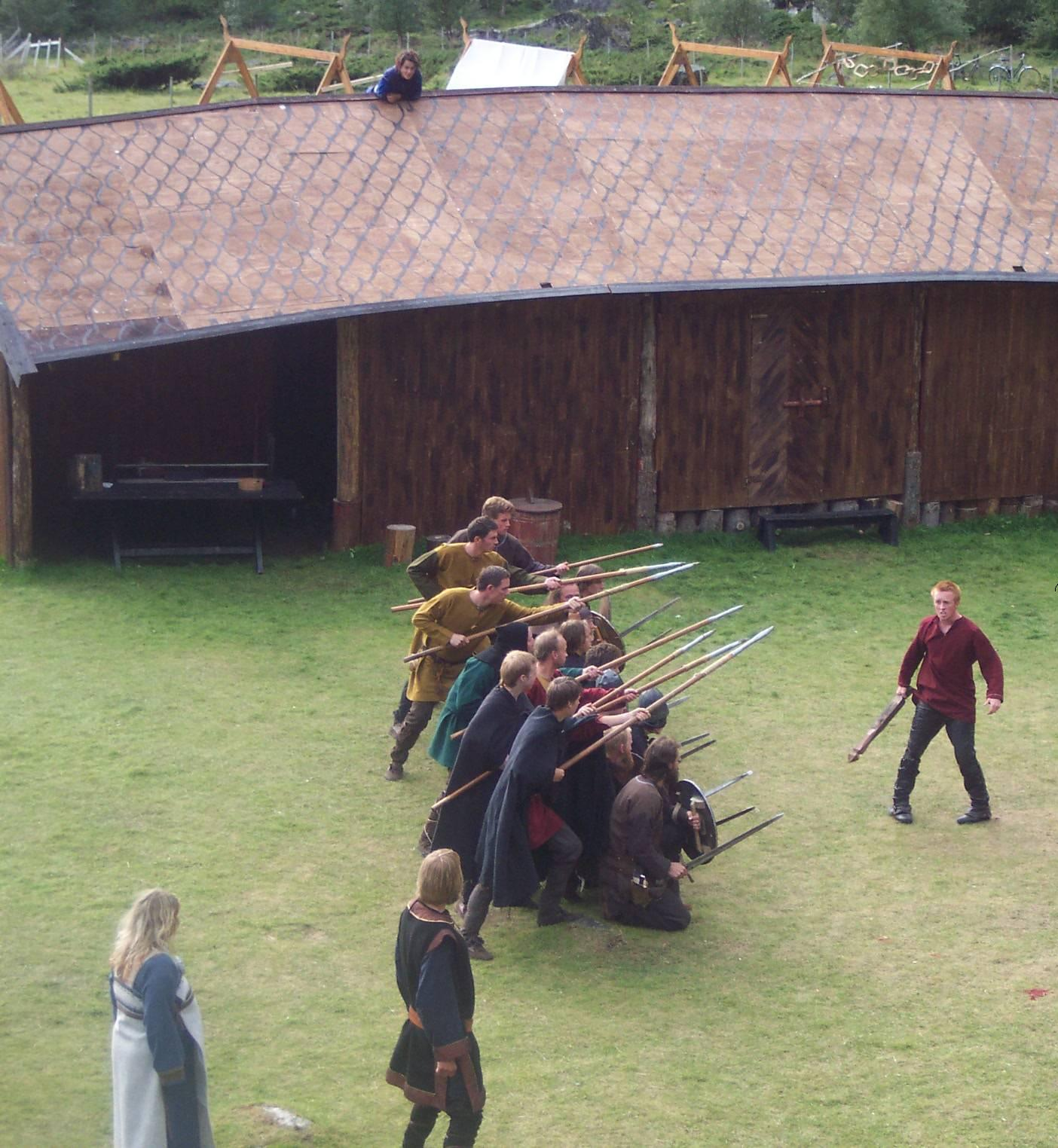 Steigen Sagaspill 2005 Vaktene står i piggsvin mot Hagbart (Sverre). Sigard (Kjetil) står bak vaktene og roper "Du skal bare overgi deg, hagbart! Du har ingen sjanse mot overmakten!". Bak ham igjenn står Berret (Nina), som har advart ham om situasjonen med hagbart i første omgang. Trym ligger på taket og ser på. Bilde tatt av Marie Pedersen med Bruker:ThorRune's kamera.